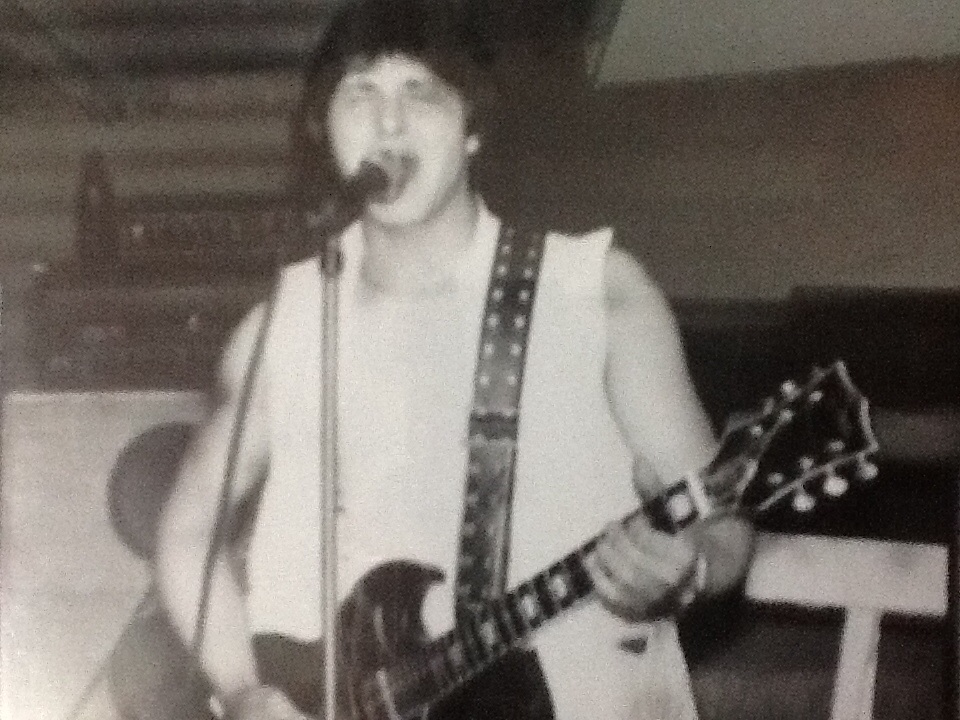 Р.Михай aka R.J.Mikay